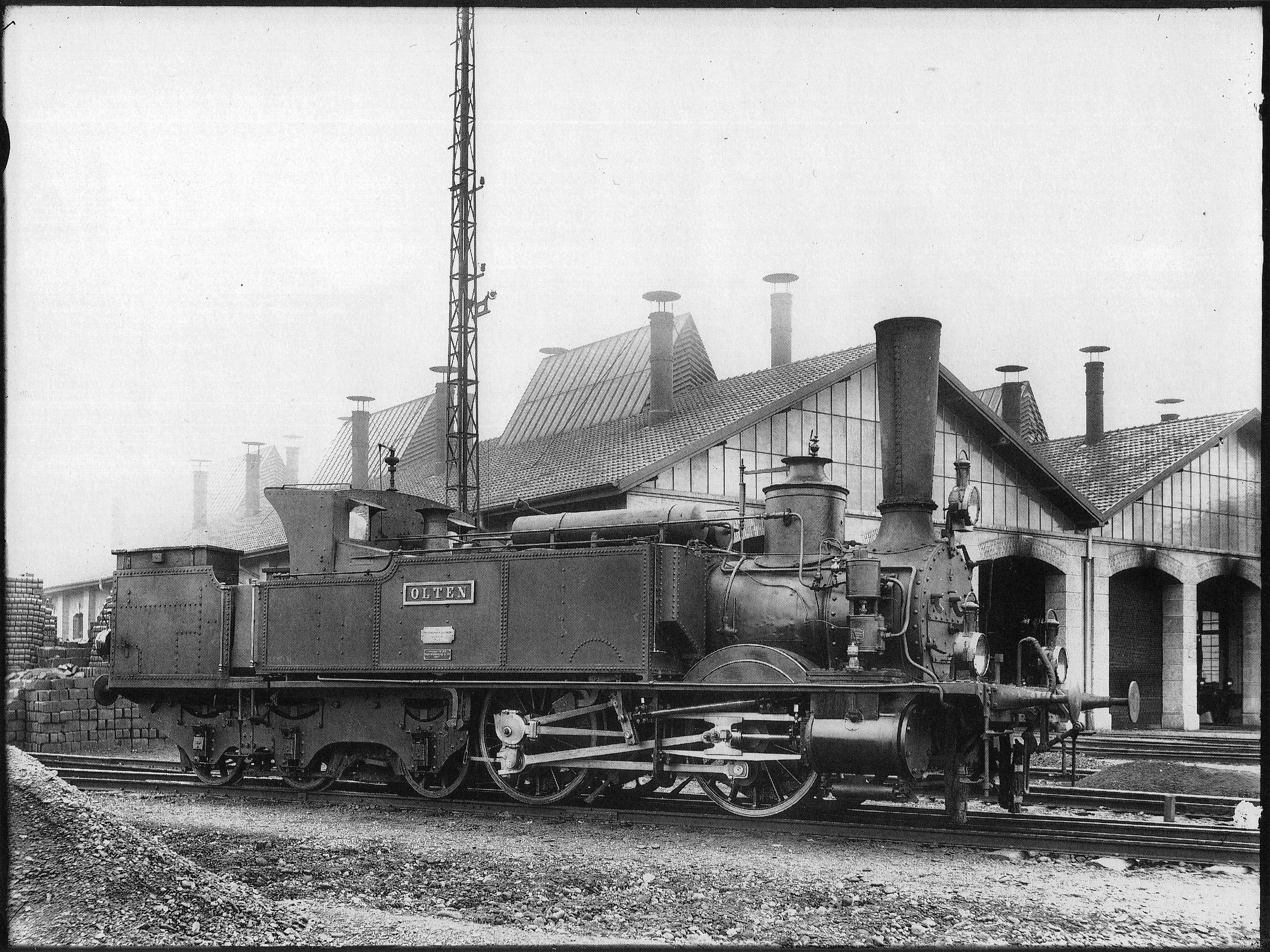 Locomotive Nr. 4 Olten (urſprünglich Jura) des Typs B2E der Schweizeriſchen Centralbahn mit Stütz-Tender (Syſtem Engerth), gebaut 1854 inn Emil Keſslers Machines-Fabrique zů Eſslingen (Fabr.-Nr. 258), 1877 mit neuem Keſſel ausgeſtattet, 1902 von den Schweizeriſchen Bundesbahnen als Ec 2/5 Nr. 6998 übernommen, 1905 außer Dienſt geſtellt und anſchließend abgebrochen; aufgnommen um 1900 im Fahrzeug-Dépôt zů Baſel.